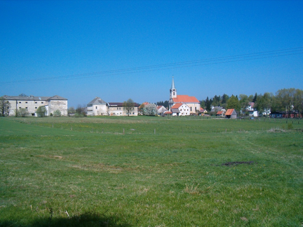 Pohled na vesnici Hůrky od jihovýchodu